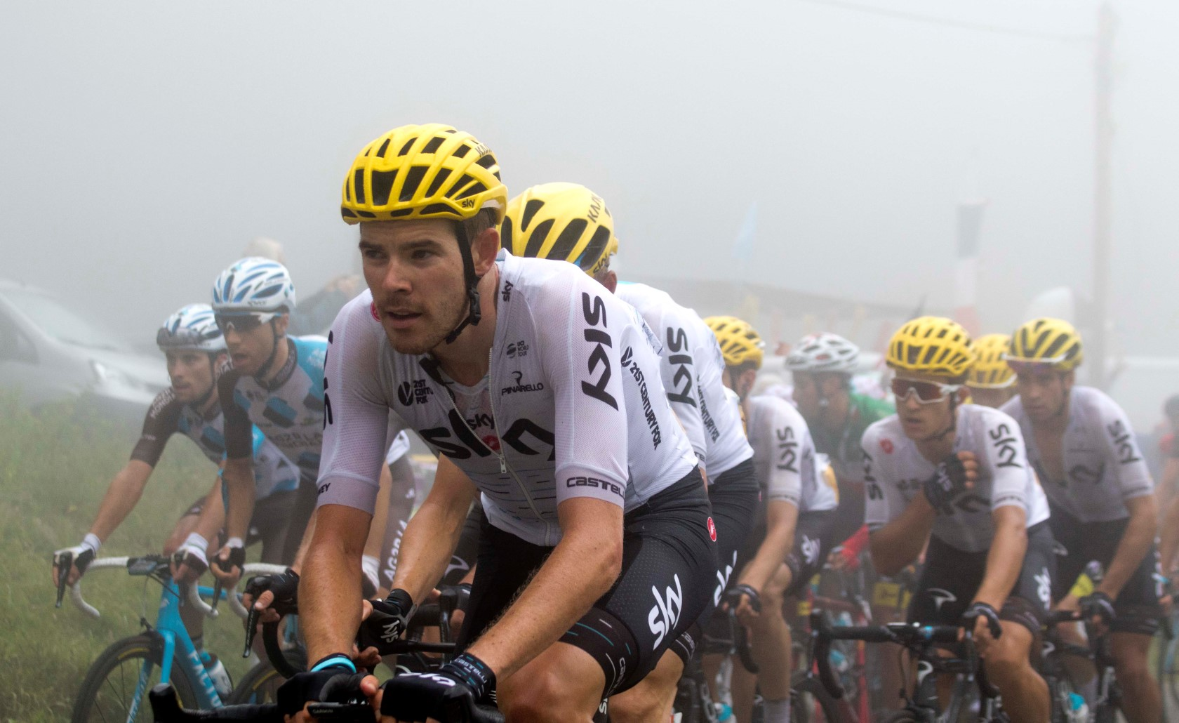 13-7_4 skyleger olv luke rowe